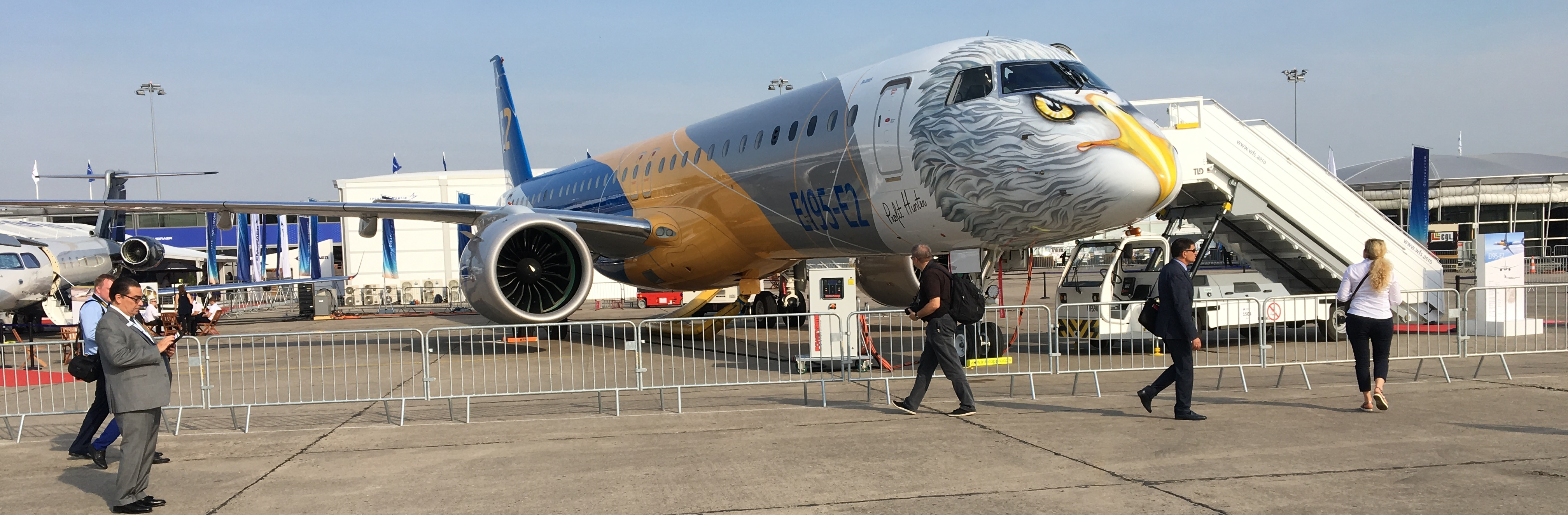 Avion E195-E2 de Profit Hunter